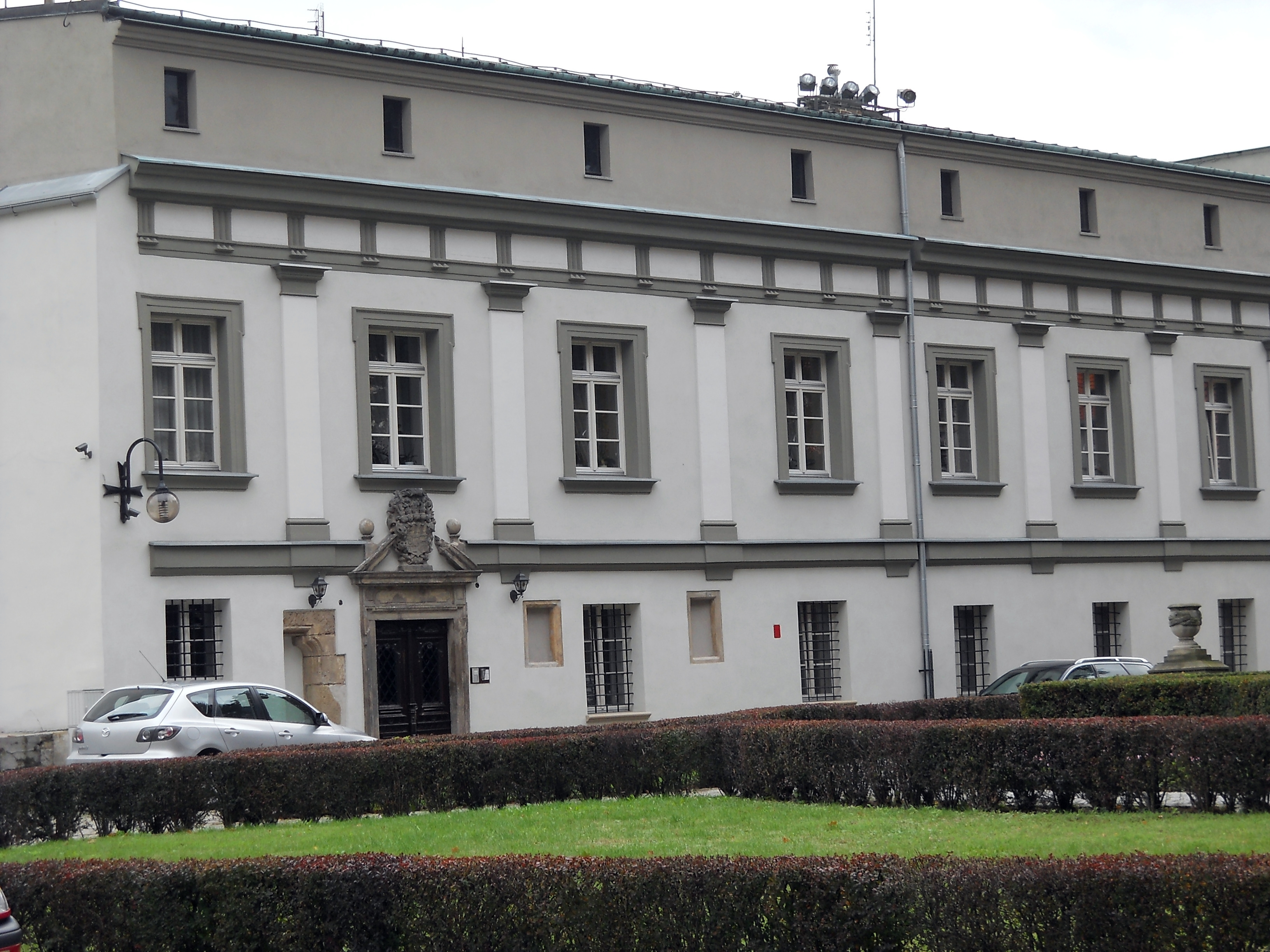 Strzegom- Komandoria - Joanitów ob.plebania